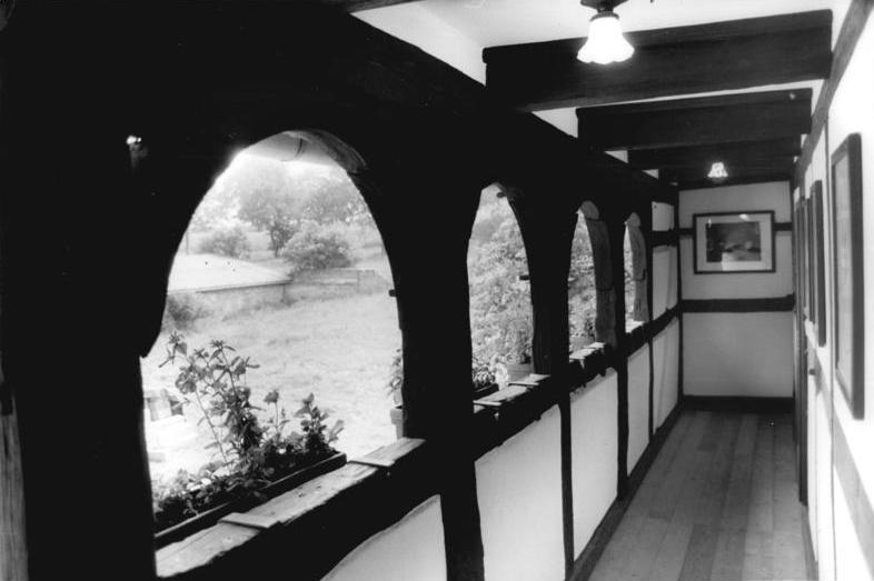 Göpfersdorf, Blick in ausgebauten Pferdestall ADN-ZB Grubitzsch 15.2.89 Bez. Leipzig: Sozialistische Demokratie-Ortsporträt Göpfersdorf-Vor allem die Pflege bäuerlicher Traditionen in dieser mit 230 Einwohnern kleinsten Gemeinde des Kreises war in der vergangenen Wahlperiode ein Hauptanliegen der Arbeit der Volksvertreter, Gemeinsam mit dem Kulturbund, Handwerkern, Genossenschaftern und Betrieben des Territoriums schufen die Bürger in vielen zusätzlichen Stunden Neues und verschönerten bereits Bestehendes. Beispielsweise wurde der ehemalige Pferdestall zu einem kulturellen Zentrum ausgebaut. In seinem Laubengang werden in den Sommermonaten Ausstellungen gezeigt. siehe auch 1989-0215-17 und 19N